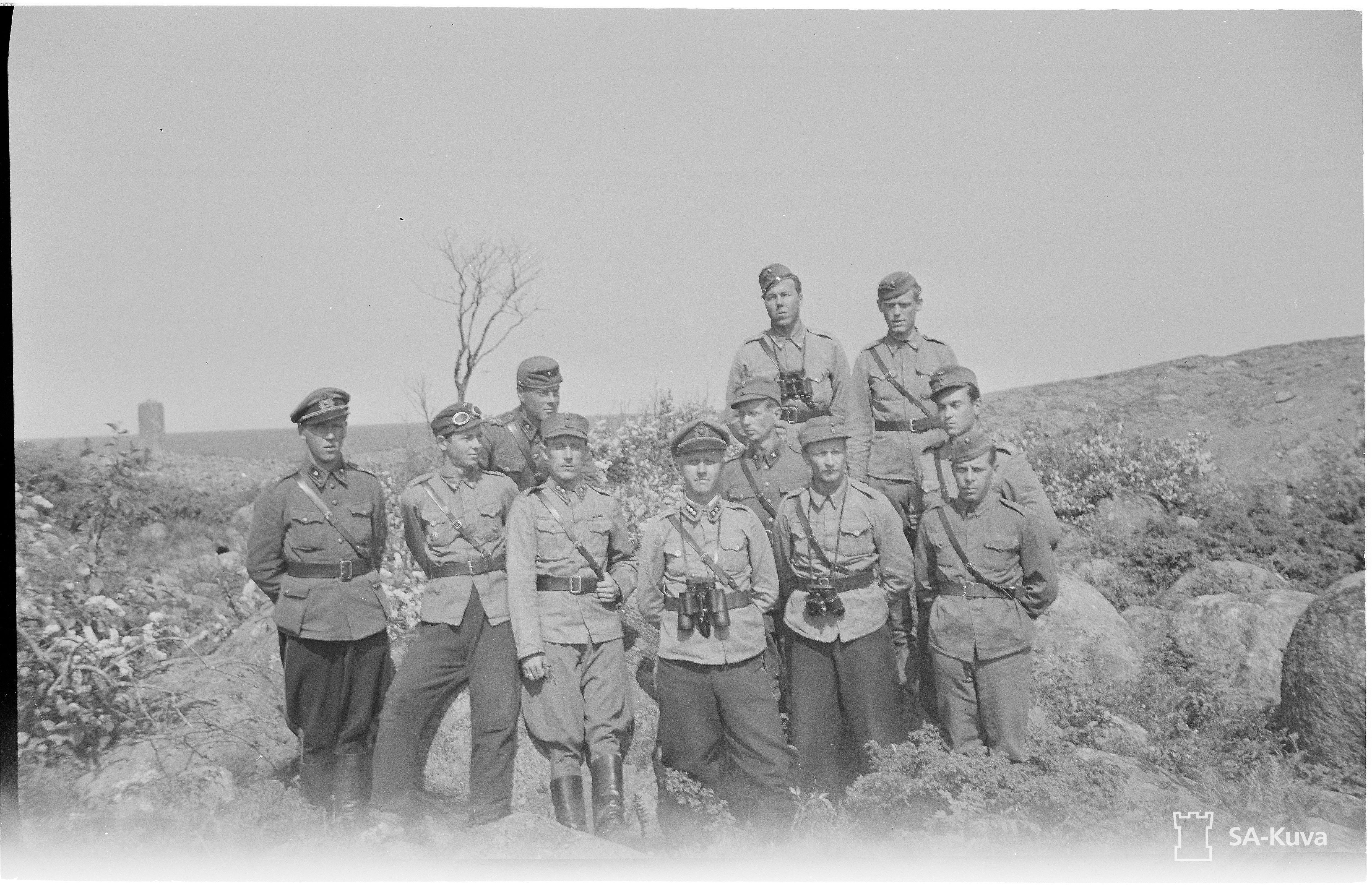 III/RTR 12:n Somerin tukikohdan upseeristo, valokuvattuna 20.6.1942. Kuvassa ovat kaikki Somerin upseerit, nimeltn: Kapteeni Veikko Rauhaniemi, luutnantti Eero Kosonen, luutnantti Arvo Lnsimies, vnrikit Gran Karlsson, Aarre Korhonen, Veikko Larmia, Unto Lehmusvuo, Esko Kolmela ja Pentti Palmunen sek lketieteen kanditaatti sot.virk. Asser Stenbck.